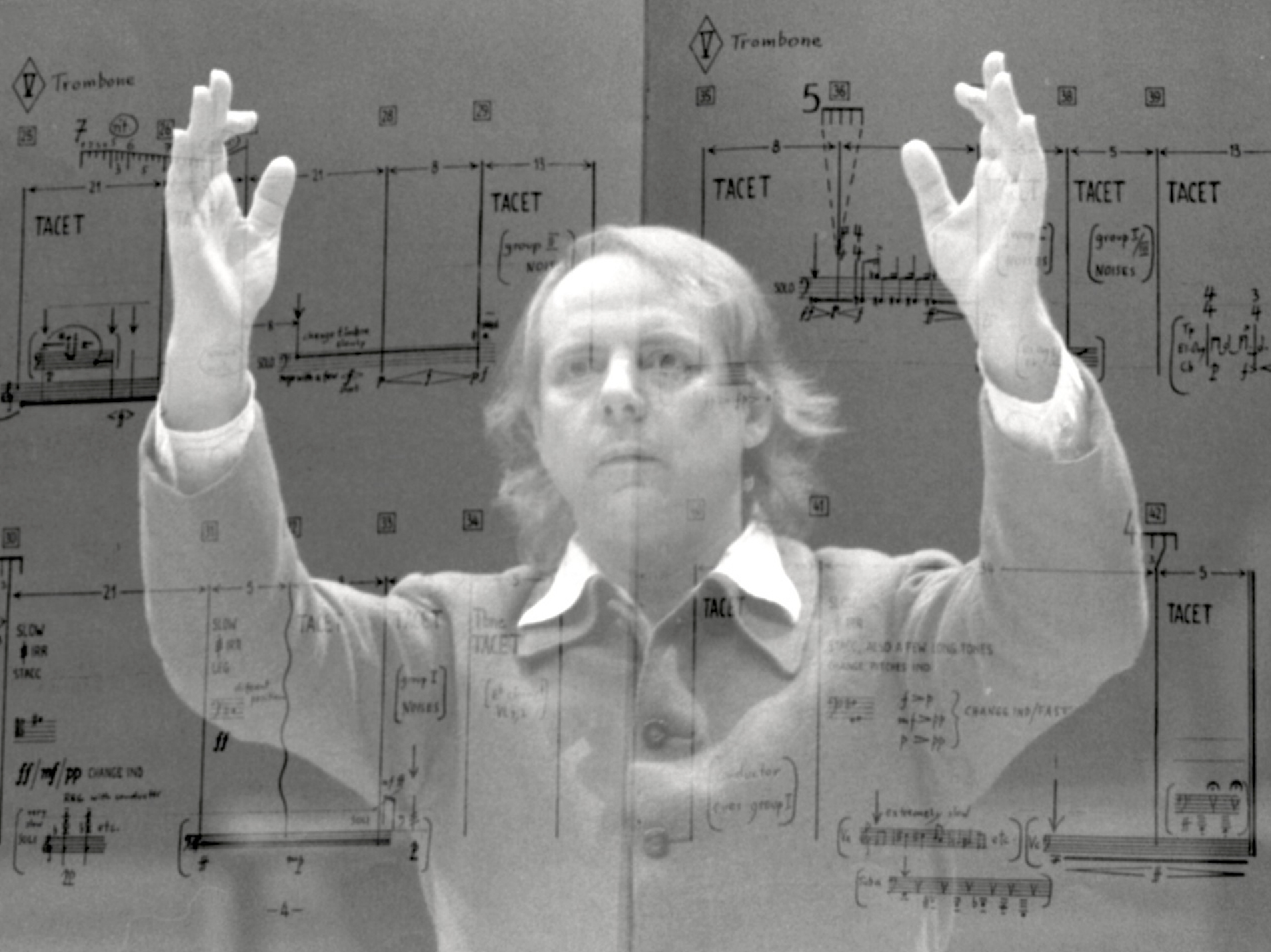 Karlheinz Stockhausen en surimpression de la partition d'une de ses composition, Strasbourg, 1980. Karlheinz Stockhausen né le 22 août 1928 à Mödrath, Allemagne, et mort le 5 décembre 2007 à Kürten, Allemagne est un compositeur allemand. Son travail se construit autour de la musique électroacoustique, de la spatialisation du son et, les dernières années, de longs cycles de création qui aboutissent à des œuvres monumentales.